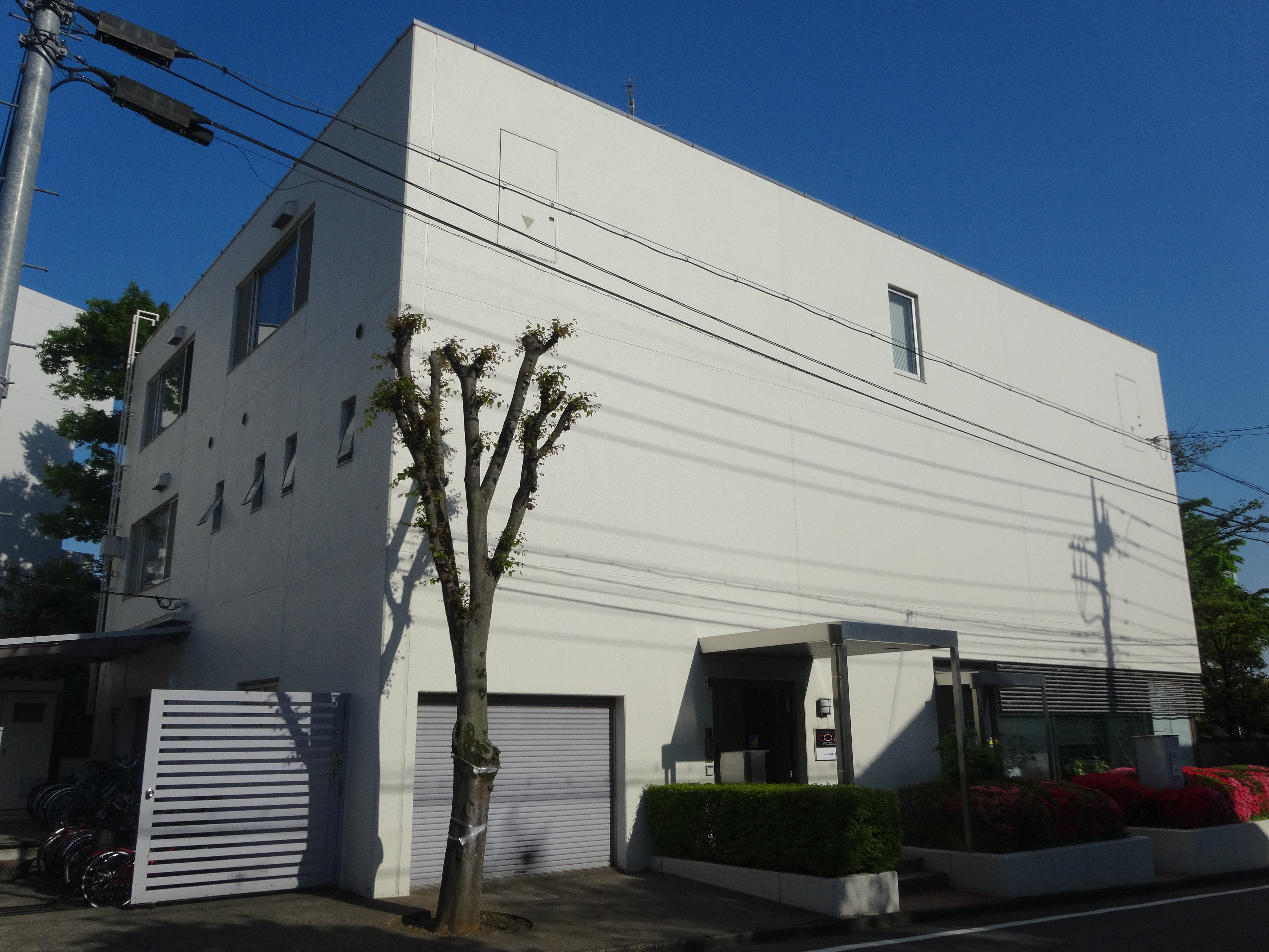 アニメ制作会社・動画工房の社屋。東京都練馬区豊玉北に所在。